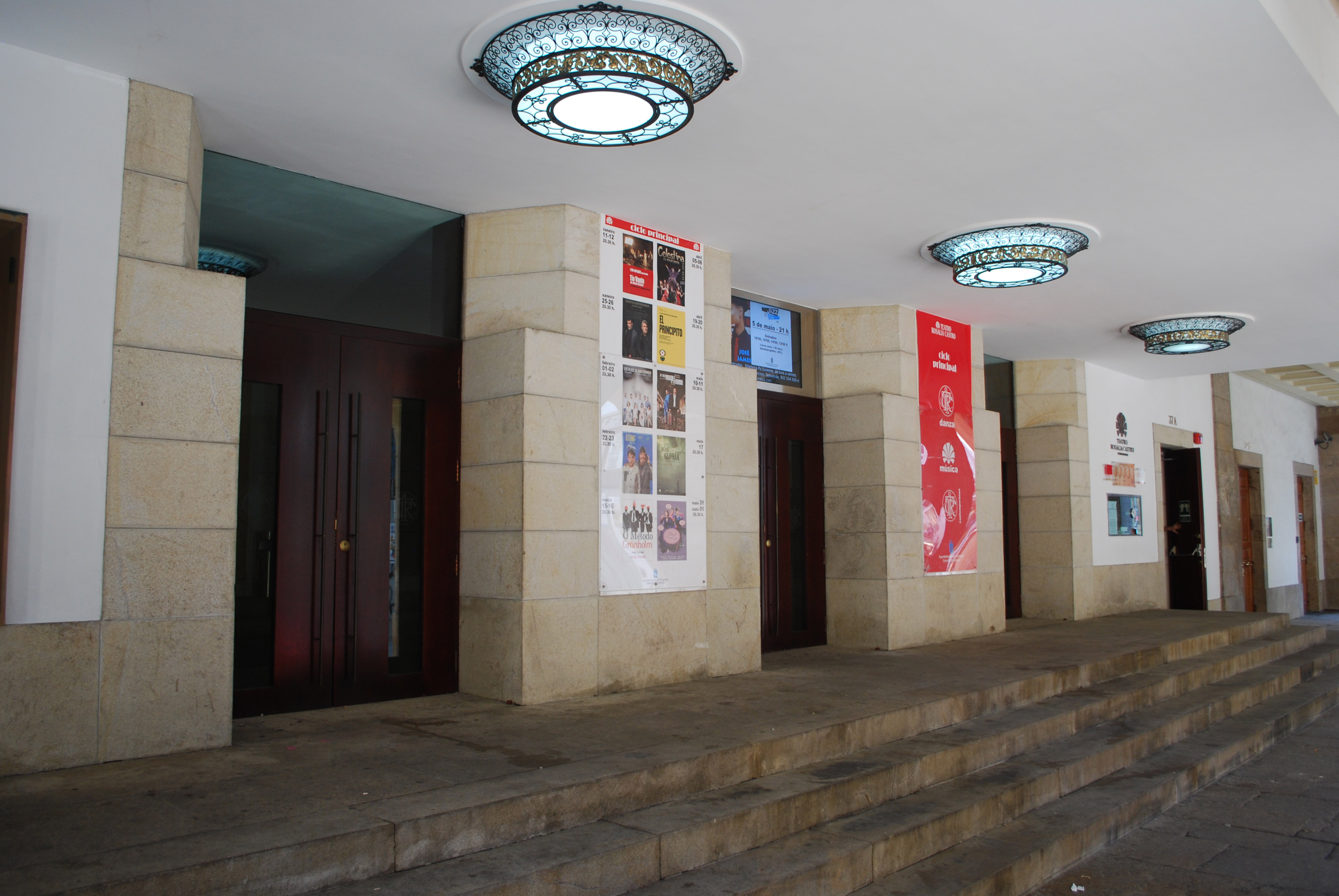 Acceso ao Teatro Rosalía de Castro A Coruña Galiza